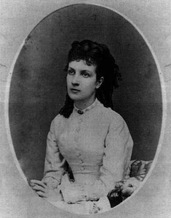 Графиня Мария Болеславовна Строганова, ур. Потоцкая(1839-1882).